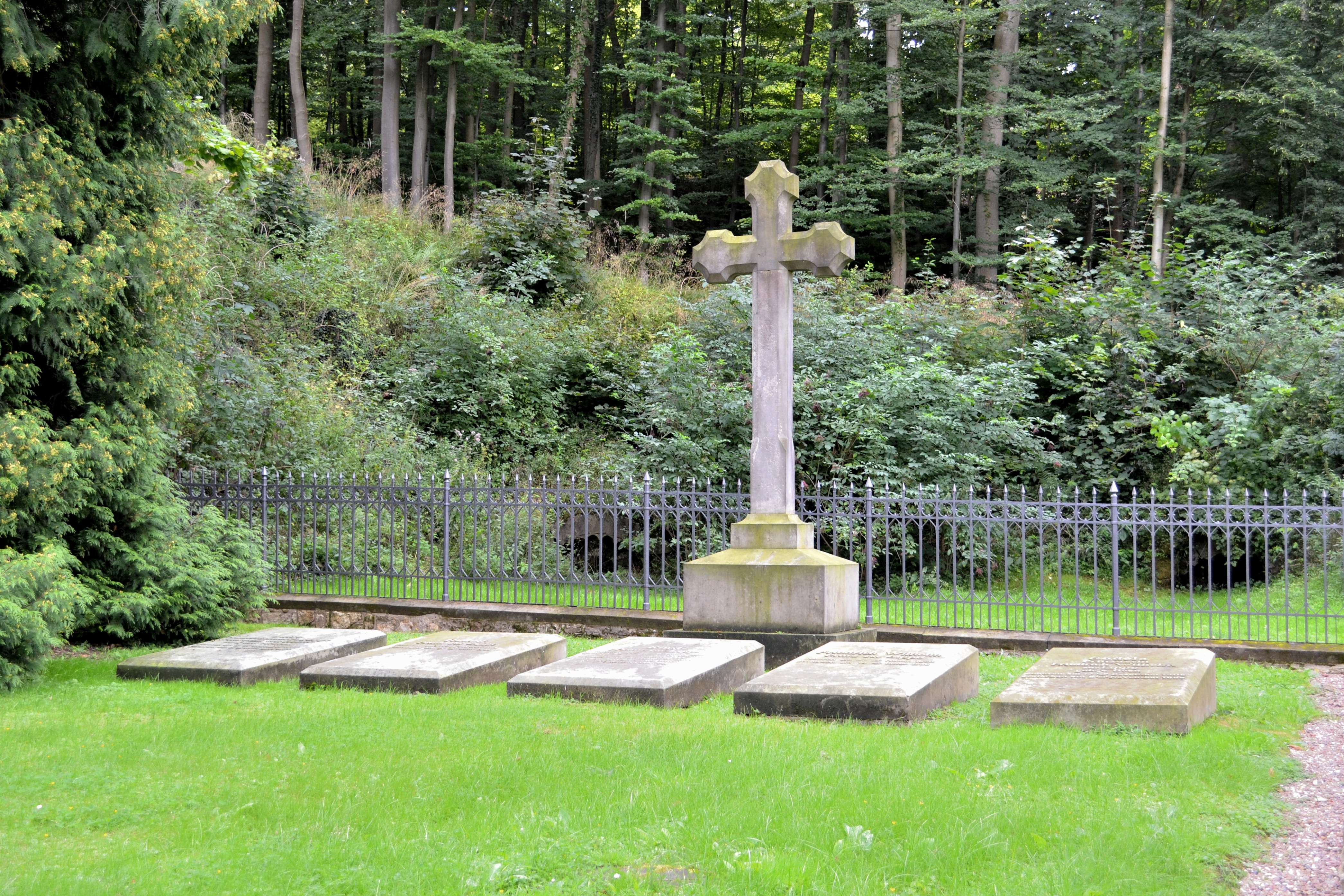 Gräber des Hauses Lippe vor dem Mausoleum am Büchenberg bei Detmold, ehemalige Grotte des Friedrichstaler Kanals